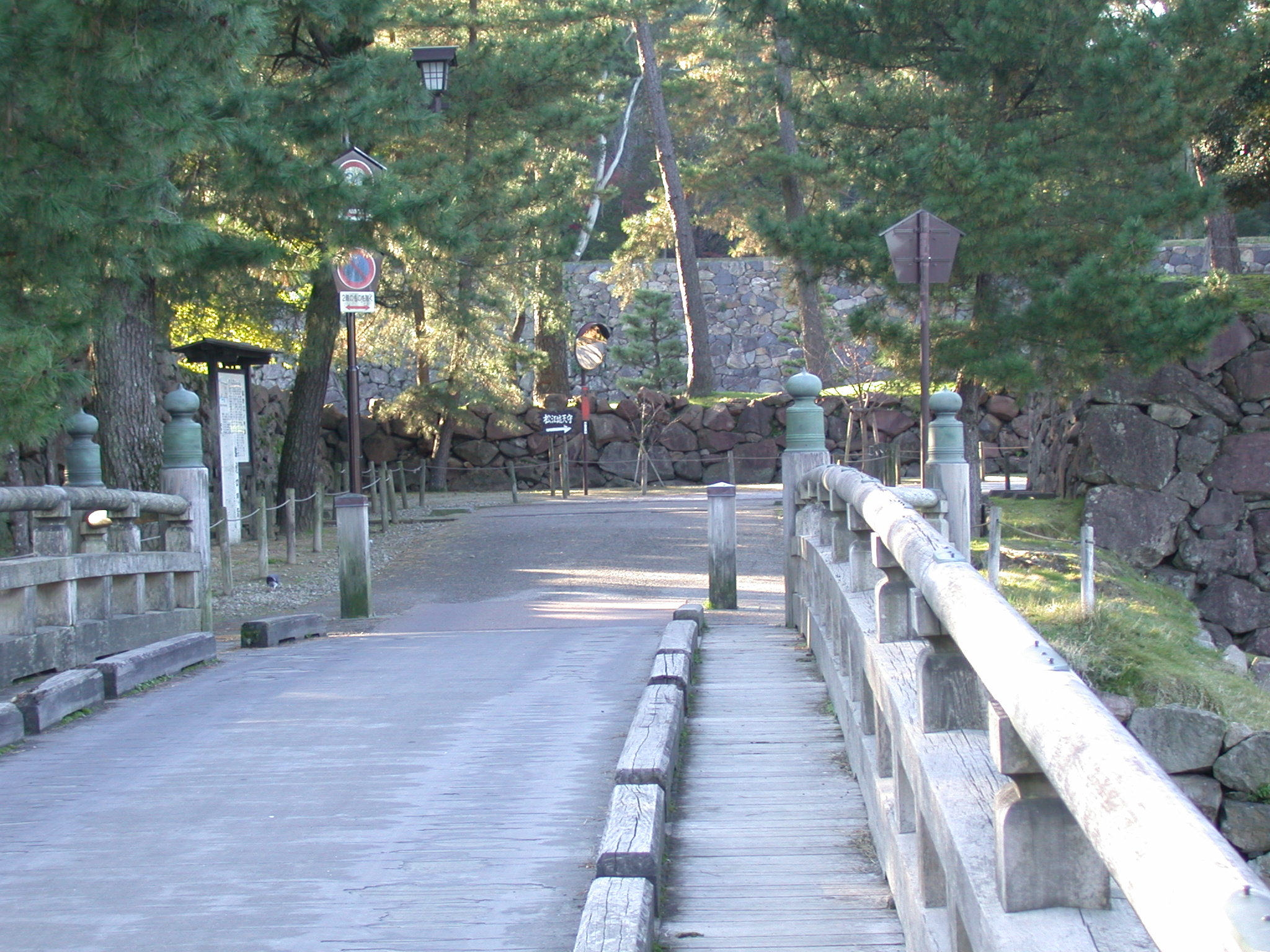 Kitasomon gate